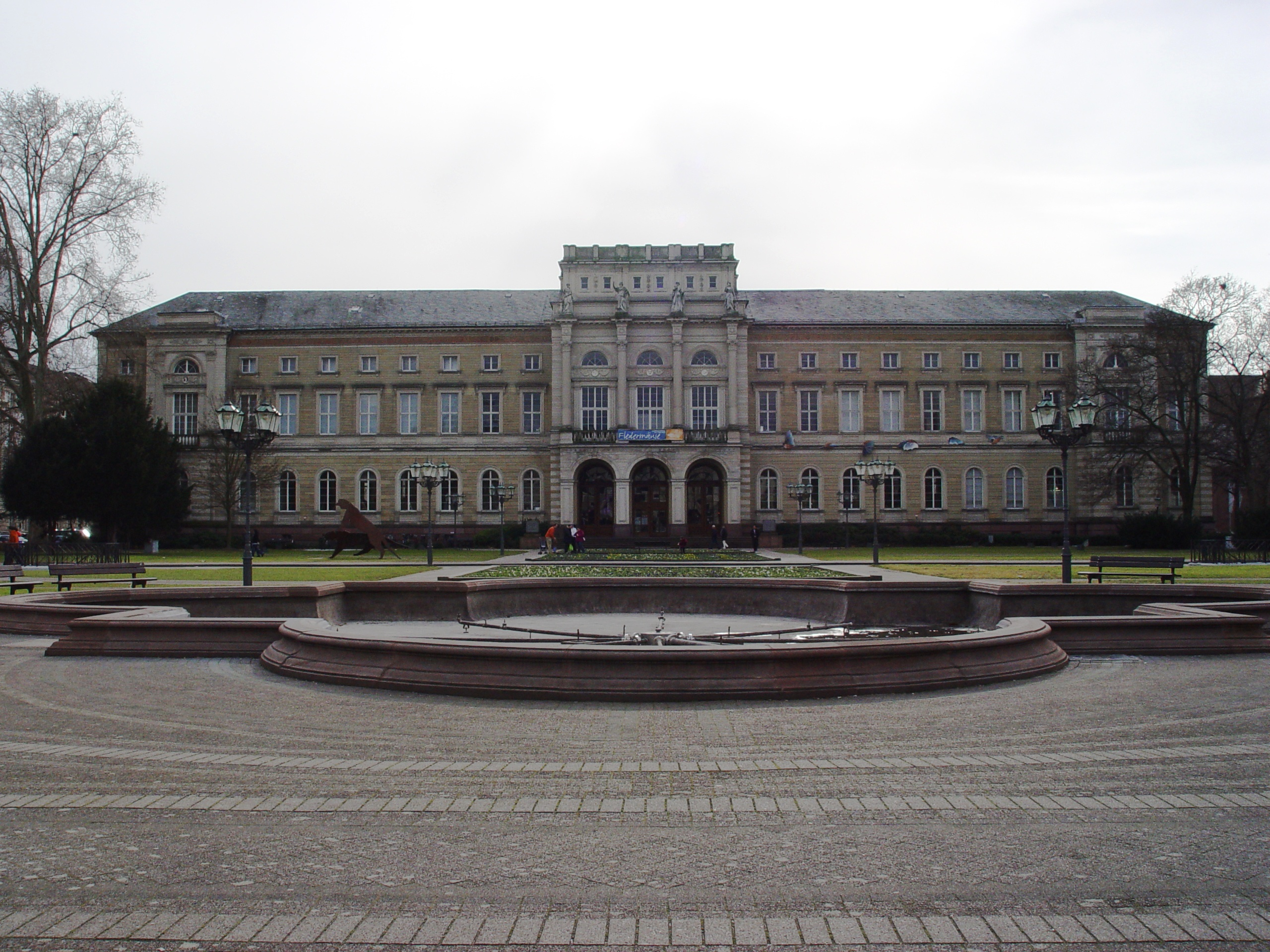 Karlsruher Naturkundemuseum